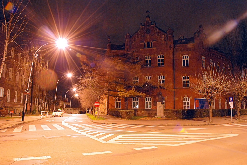 Budynek I Liceum Ogólnokształcącego im. Mikołaja Kopernika w Krośnie.